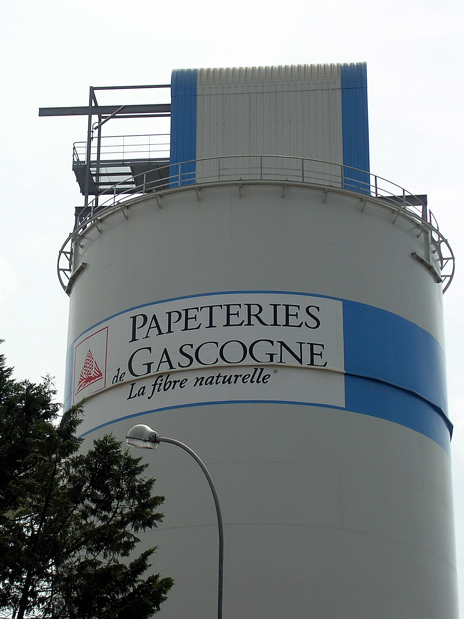 Papeterie de Gascogne à Mimizan (Landes, France). Photo prise par Jibi44 en juillet 2006.